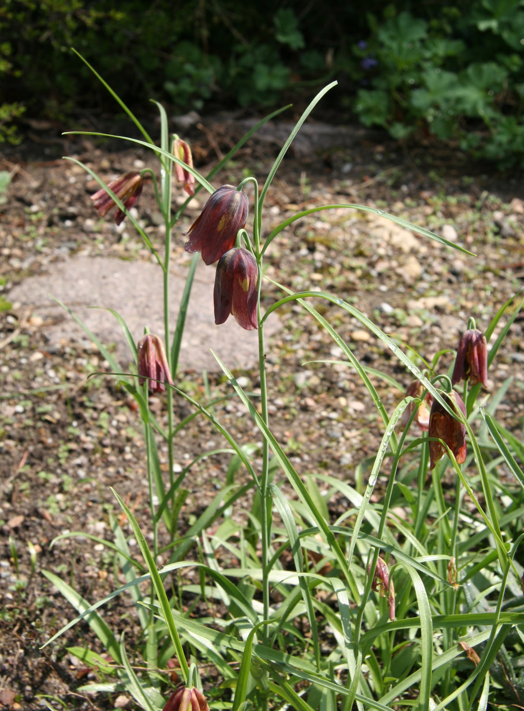 Fritillaria_messanensis im Botanischen Garten Dresden